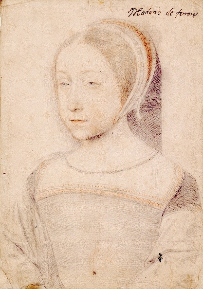 Portrait of Renée de France duchesse de Ferrare (1510-1575)